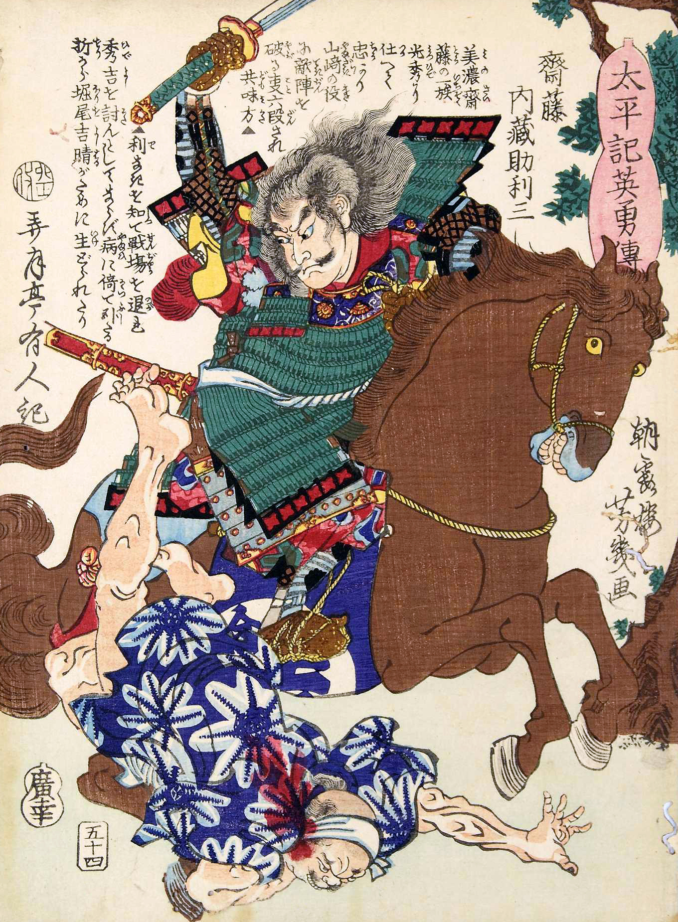 「太平記英勇伝五十四：齋藤内蔵助利三」